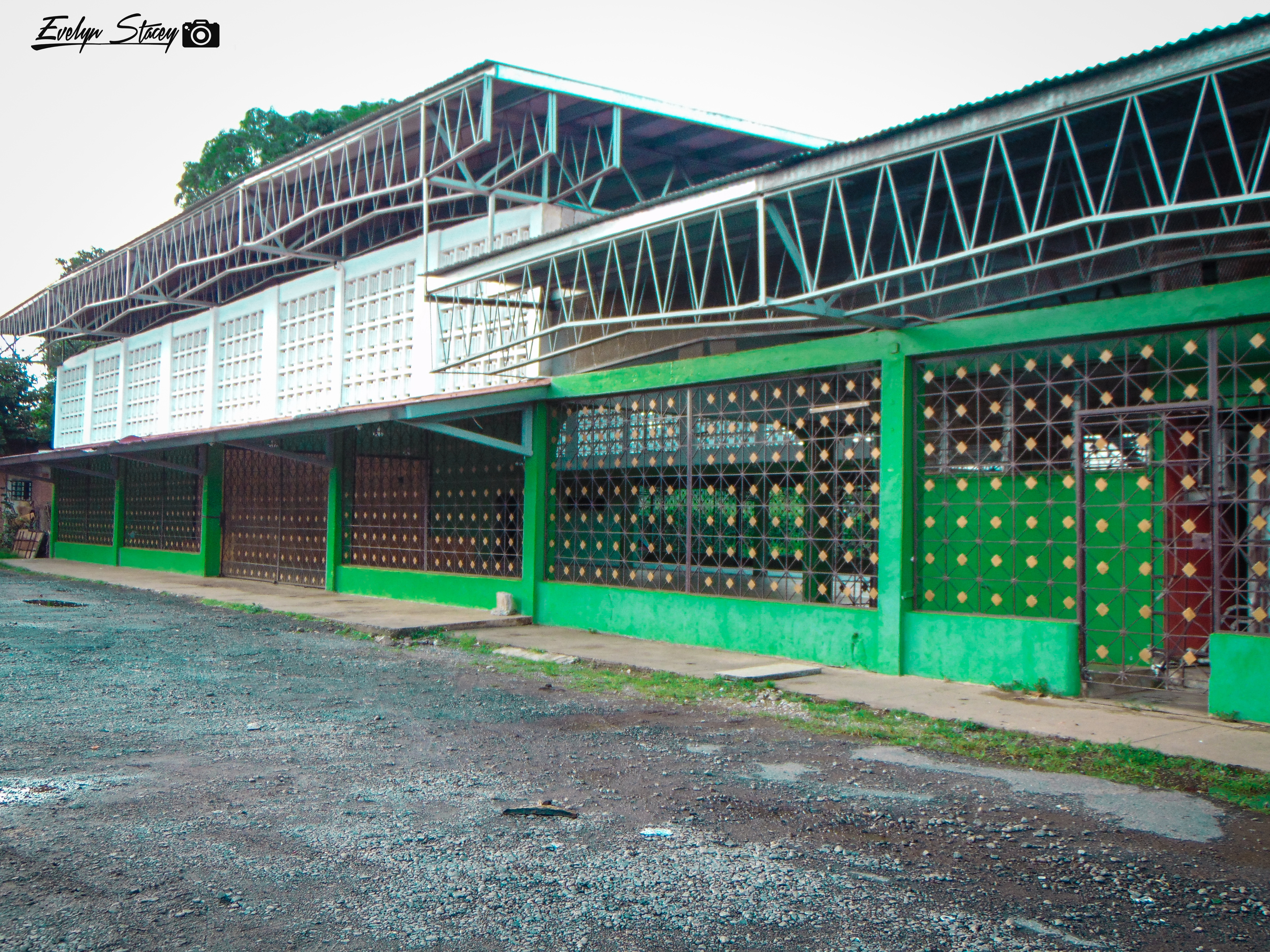 Fotografía de la casa del pueblo en Pocrí